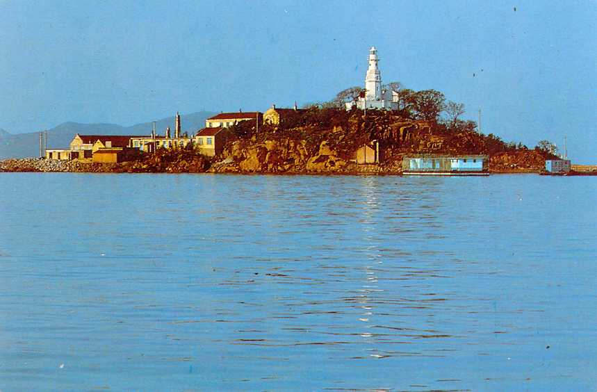 小青岛历史照片